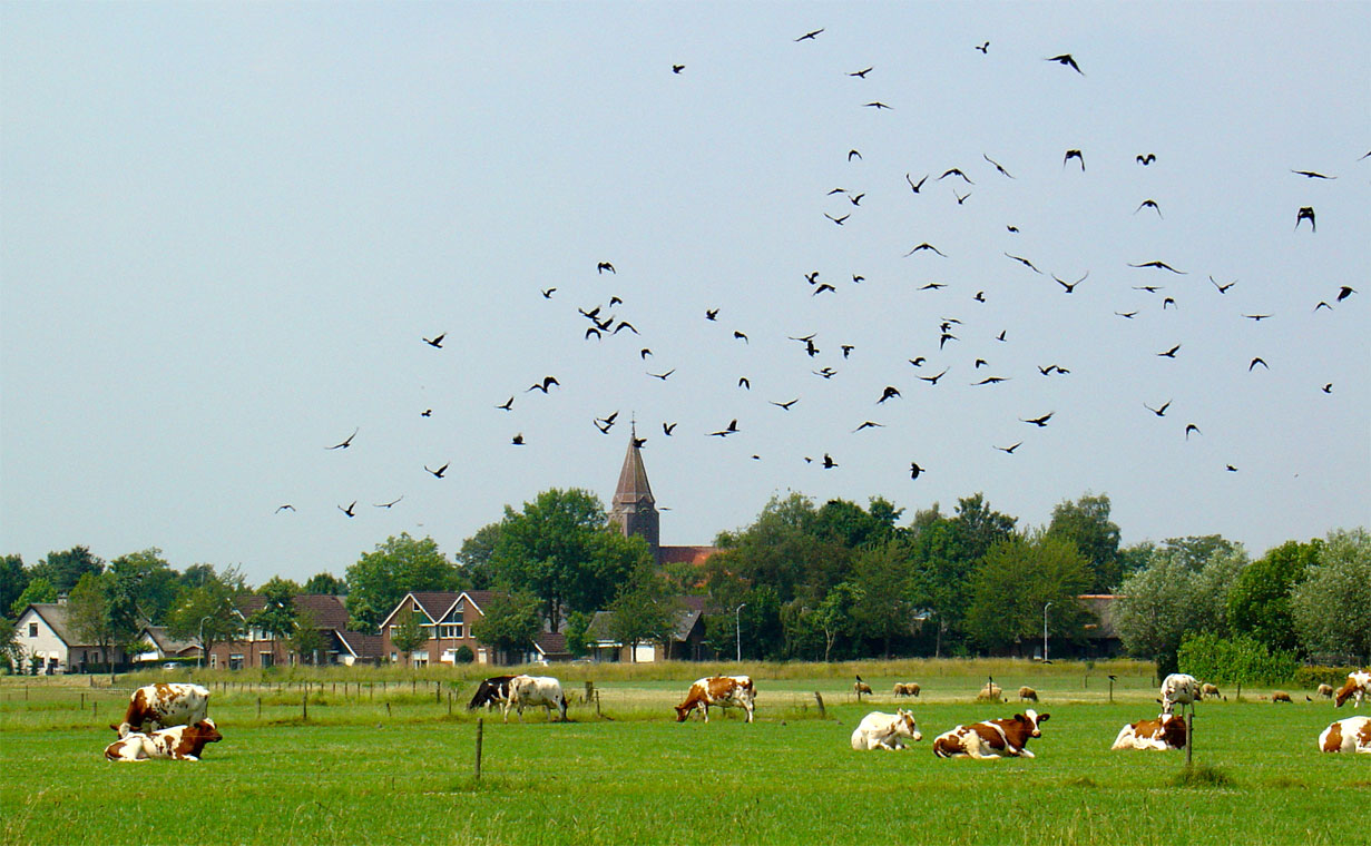 Zicht op Varsselder